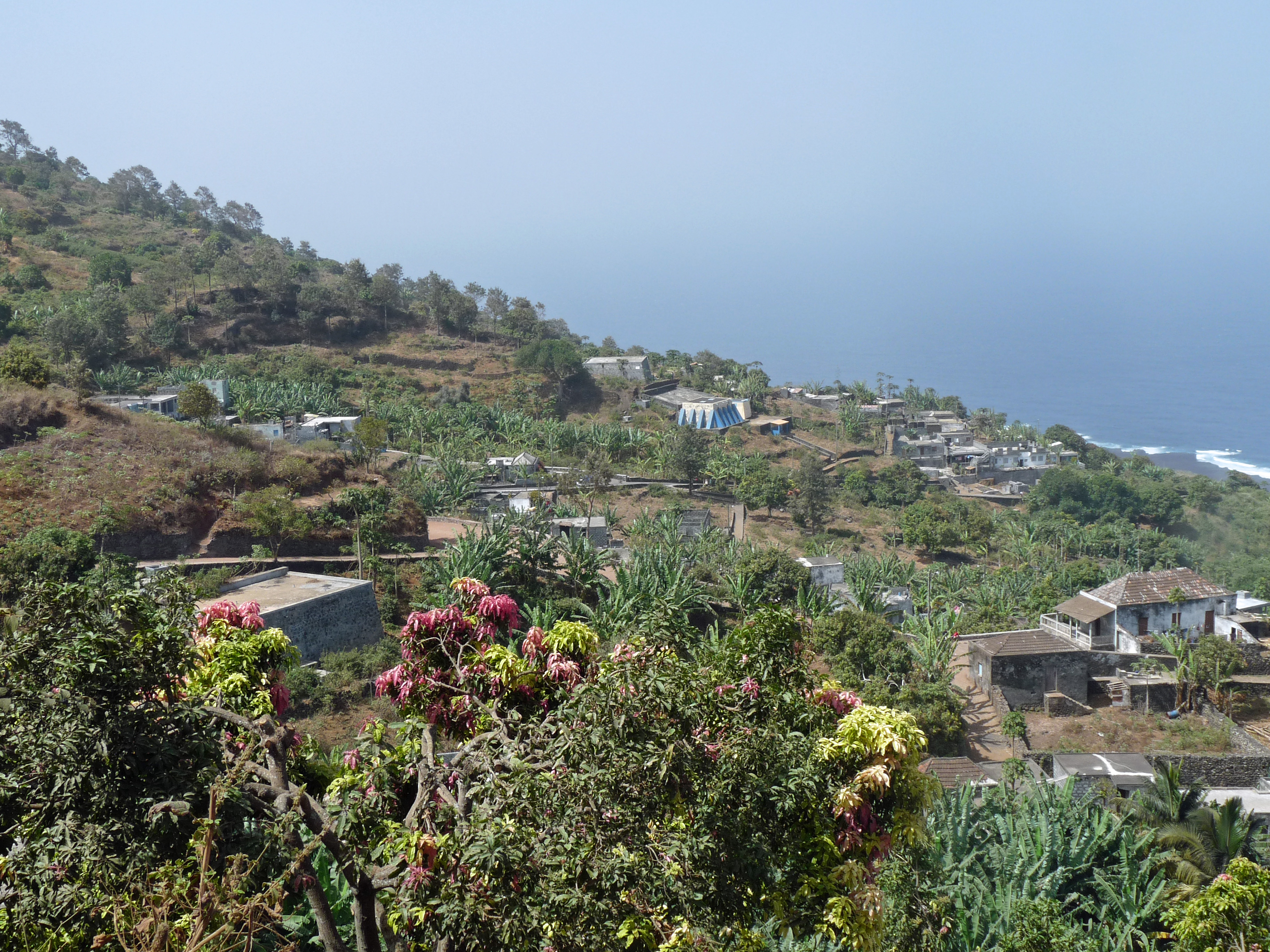 Vue sur Mosteiros (au nord de l'île de Fogo, Cap-Vert), depuis les hauteurs